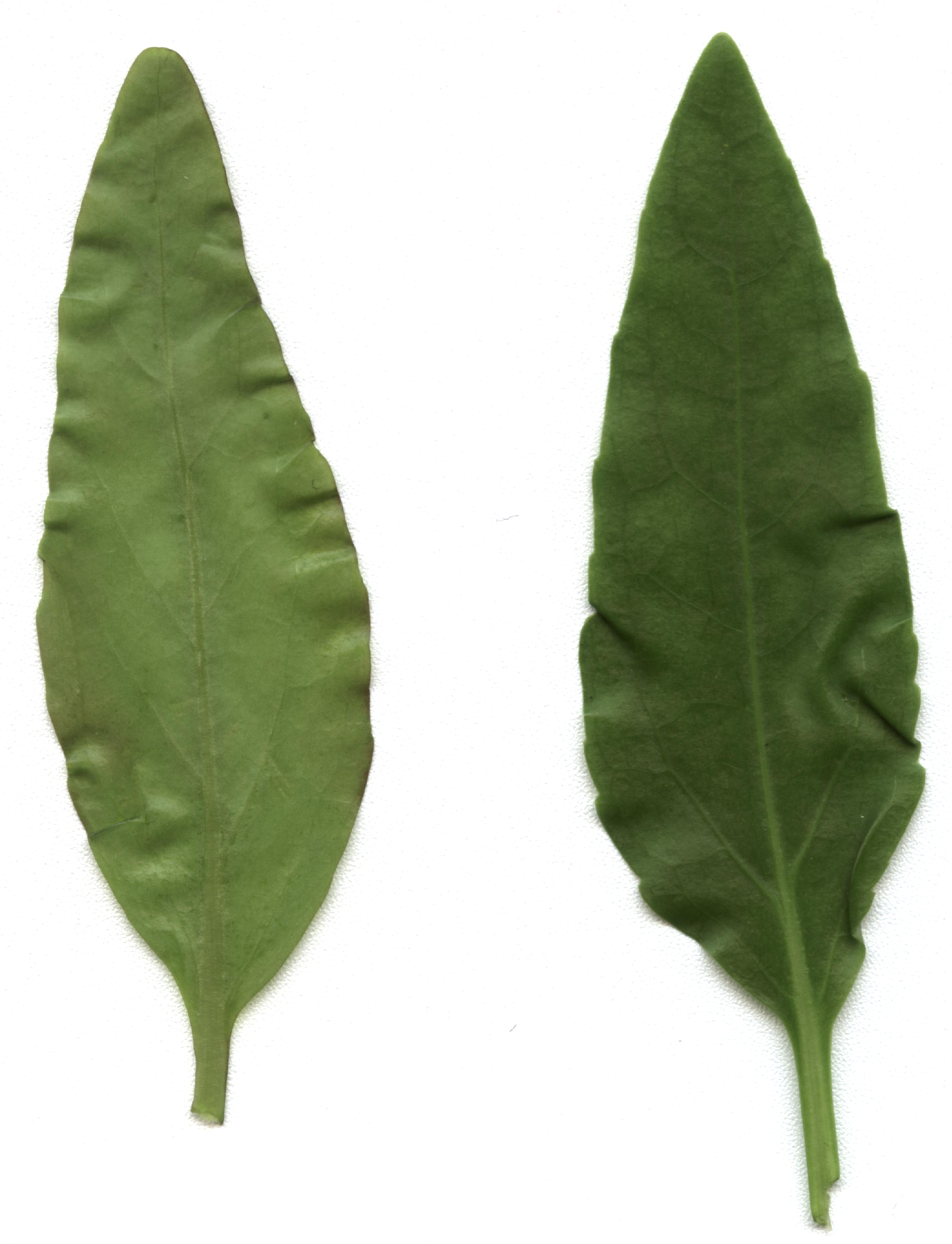 Verschiedene Blätter des Falschen Wasserfreundes